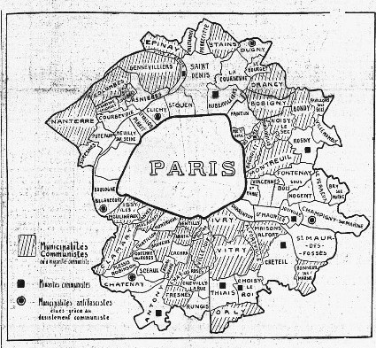 Les municipalités à direction communistes dans l'ancien département de la Seine apèes les élections municipales françaises de mai 1935.